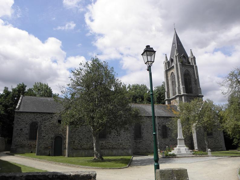 Église Notre-Dame et Sainte-Anne à La Ville-ès-Nonais (35).